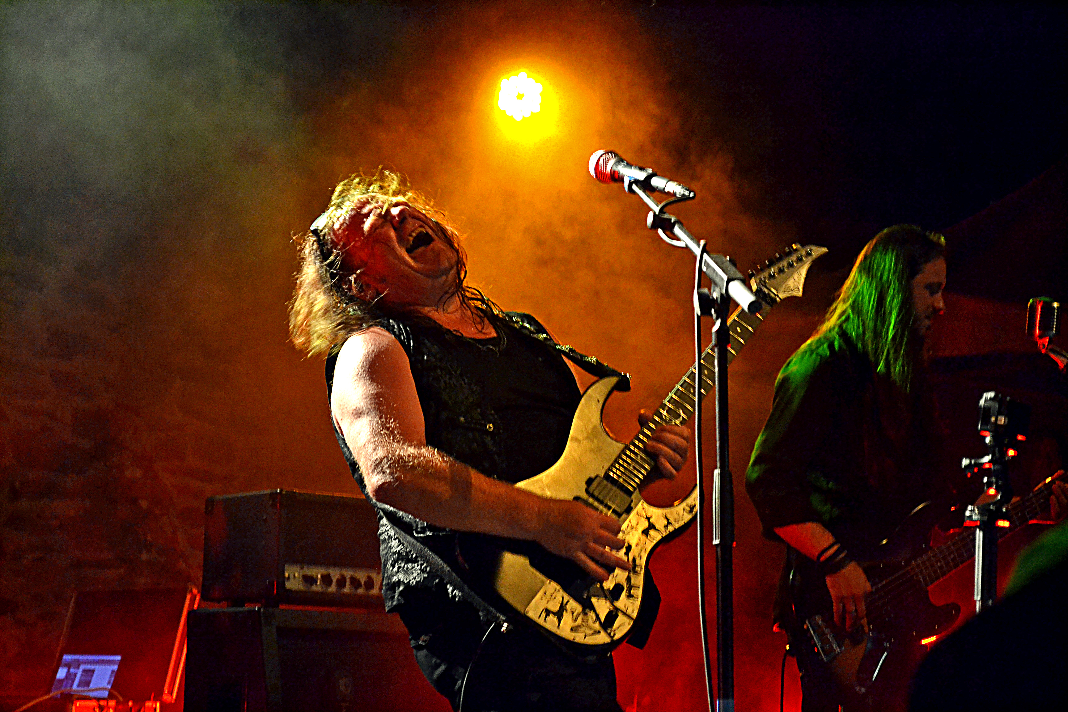 Pat O’May en concert au fort du Dellec, à Plouzané, le 10 juillet 2015.